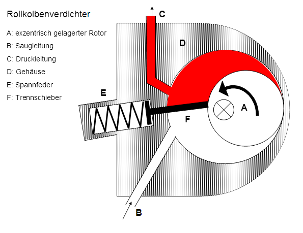 Schematische Darstellung eines Rollkolbenverdichters